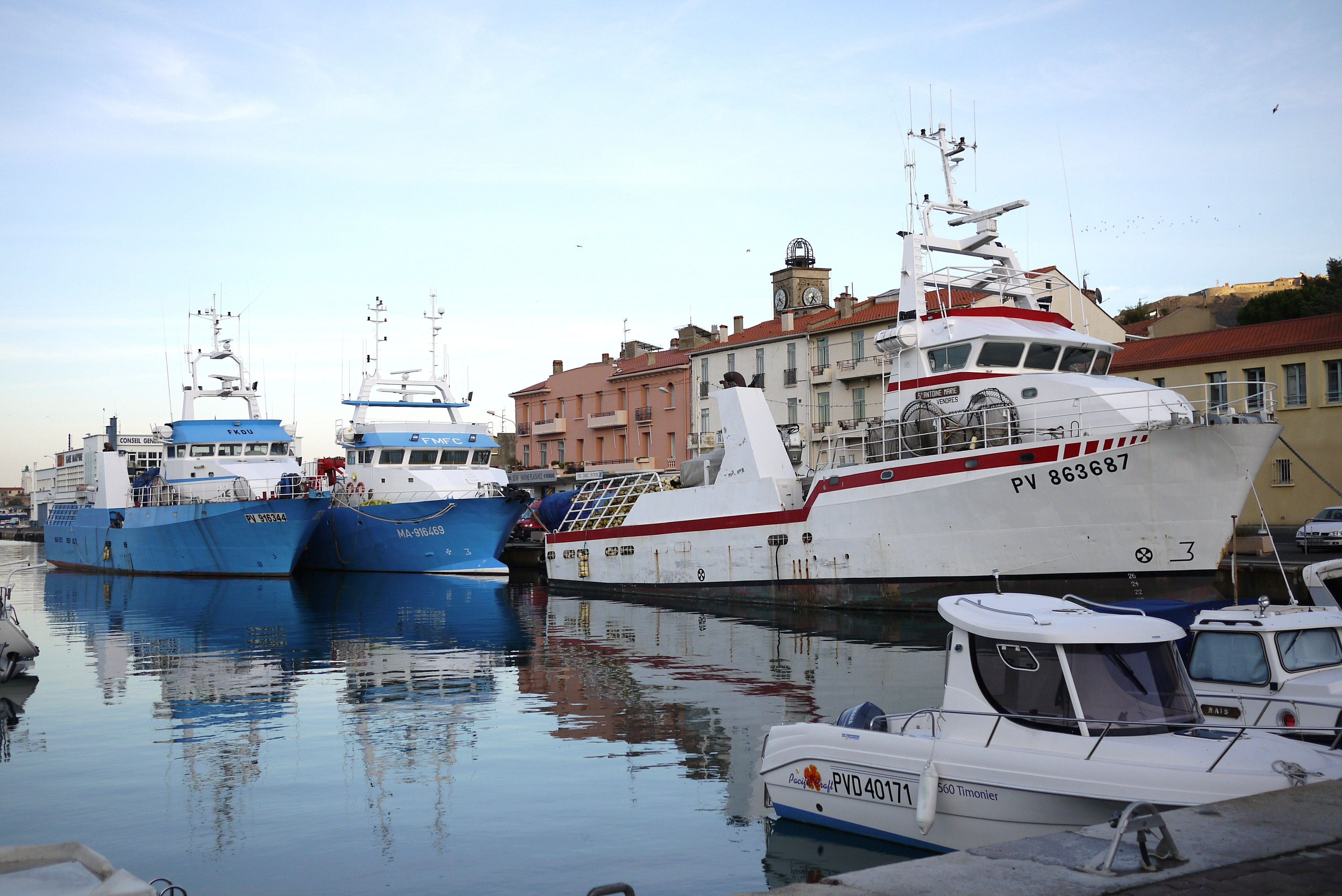 Les thoniers-senneurs "Saint Antoine Marie" (1996, PV 863687), "Gerald Jean III" (1998, PV 916344) et "Gerald Jean IV" (2005, MA 916469) amarrés au Quai de la République dans le port de Port-Vendres. Port-Vendres, Pyrénées-Orientales, France.